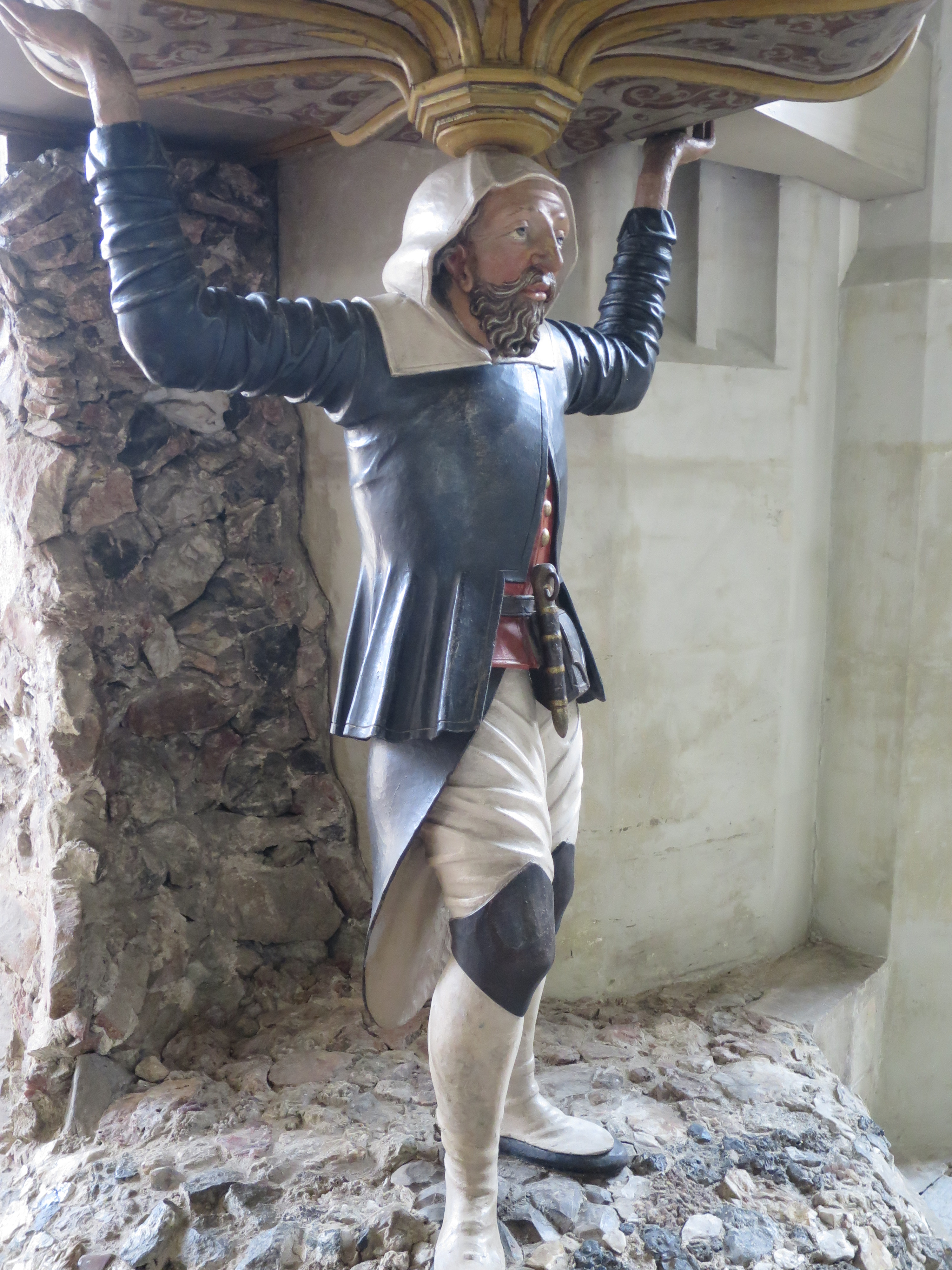 Obersteiger mit Festtracht